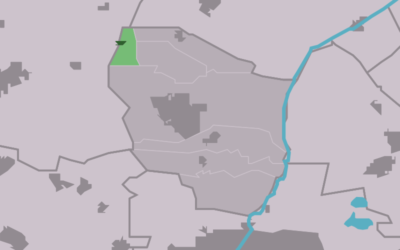 Kaartsje fan himrik fan Alde Leie